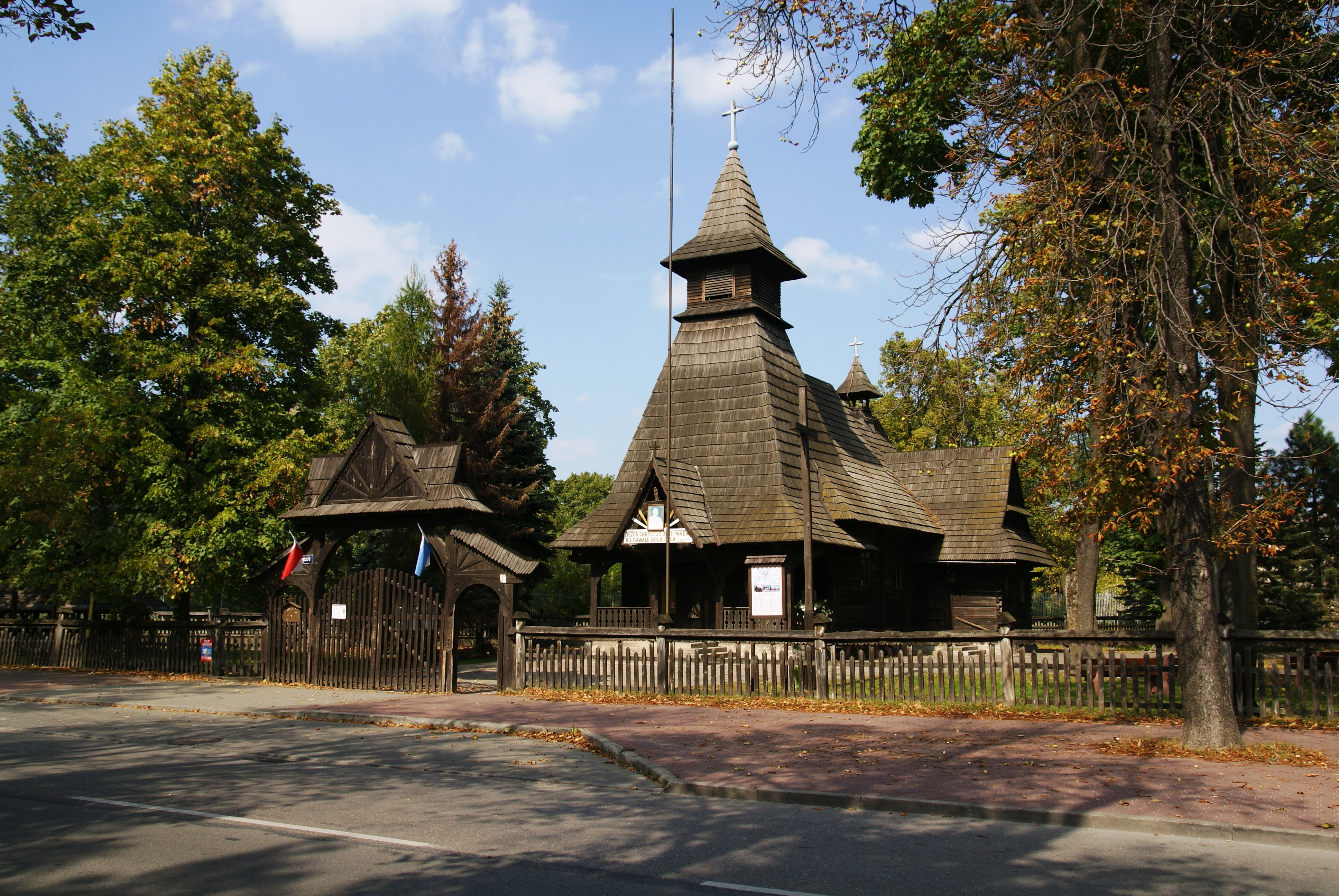 Zespół kościoła par. p.w. Przemienienia Pańskiego: kościół, drewn. dzwonnica, drewn. ogrodzenie z bramką, drewn. Kielce, Kolonia 9, Kielce 401/1-3 z 14.04.1.